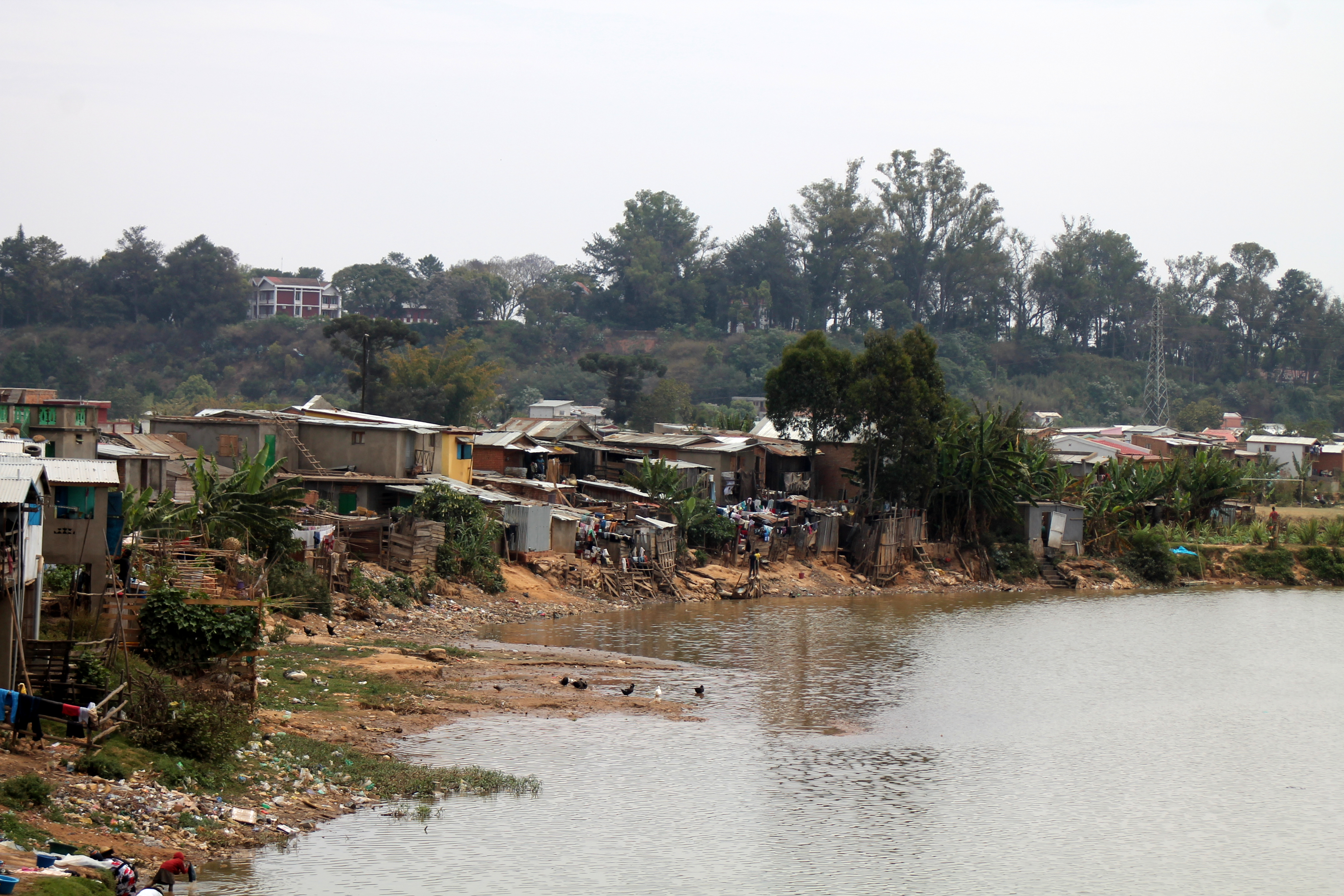 Antananarivo